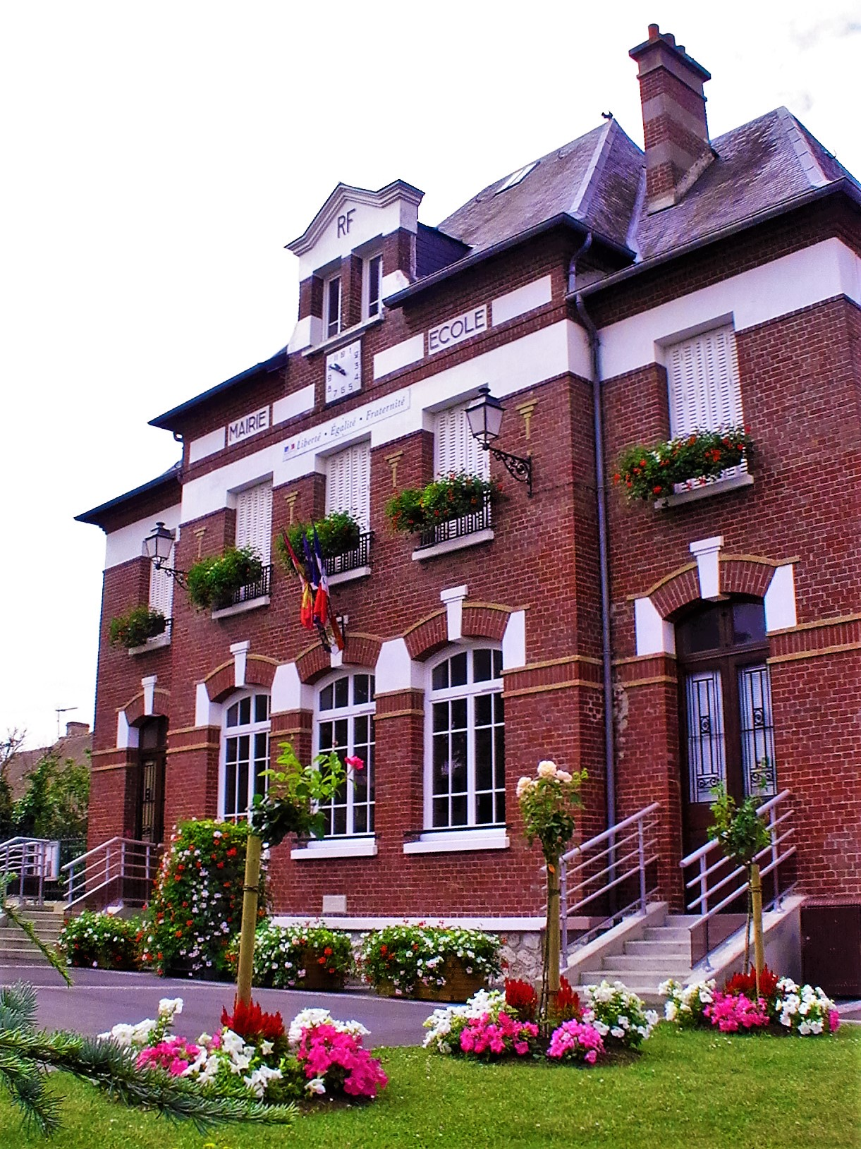 Façade de la mairie de Courcelles-sur-Seine - Eure - 2016